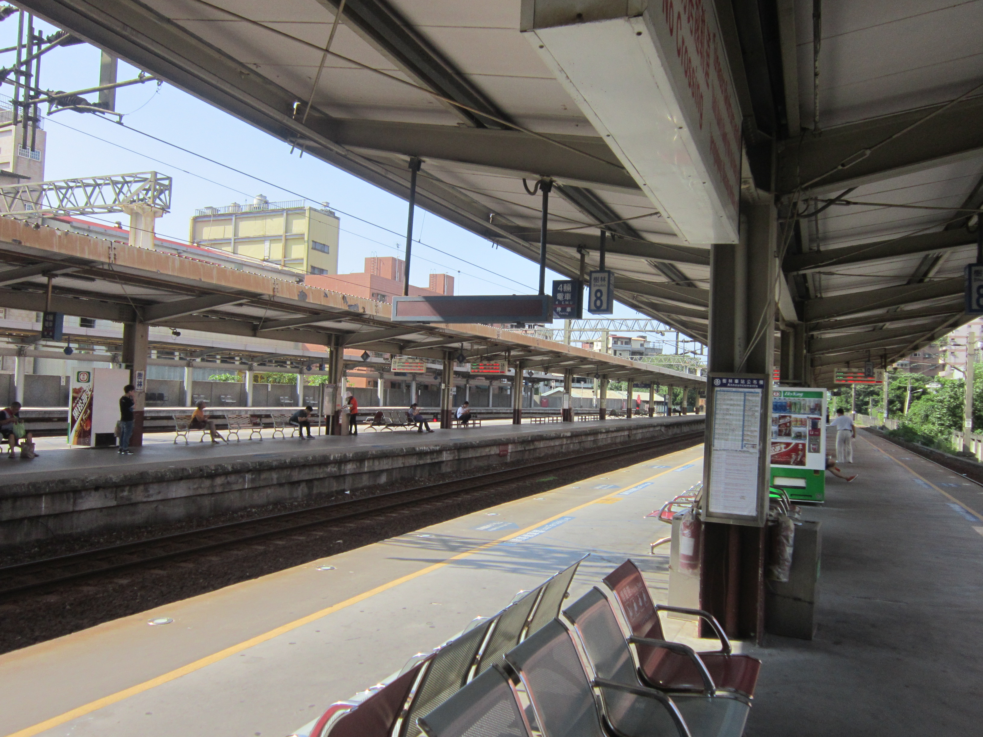 臺灣鐵路管理局樹林車站月台配置為兩座島式月台及一座岸式月台。